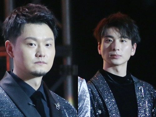 中文（中国大陆）: 2019年3月28日，鞠红川（左）和蔡程昱（右）出席《请回答，歌手》线下活动